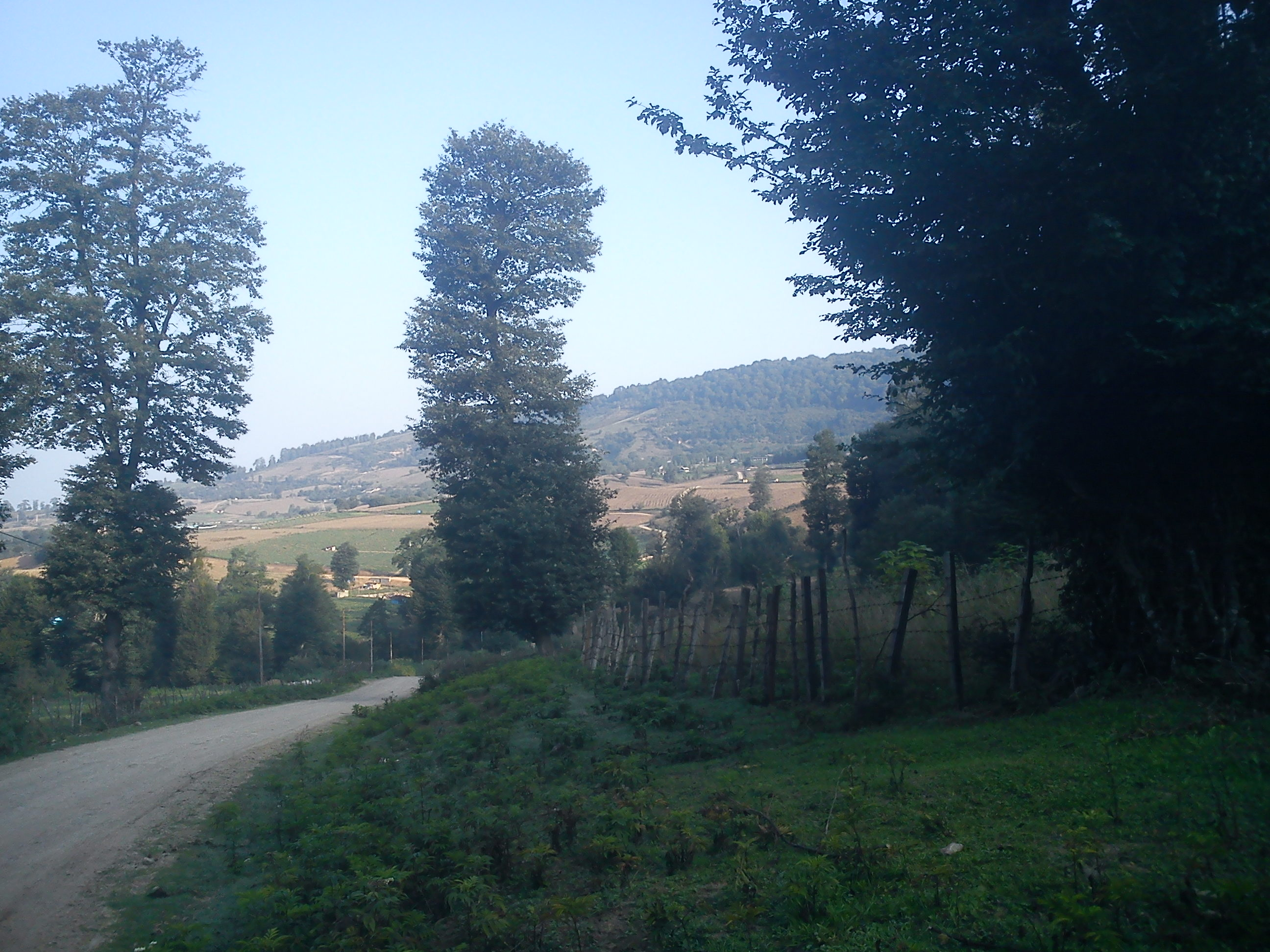 روستای نوکنده‌ی ساری در صبحی تابستانی